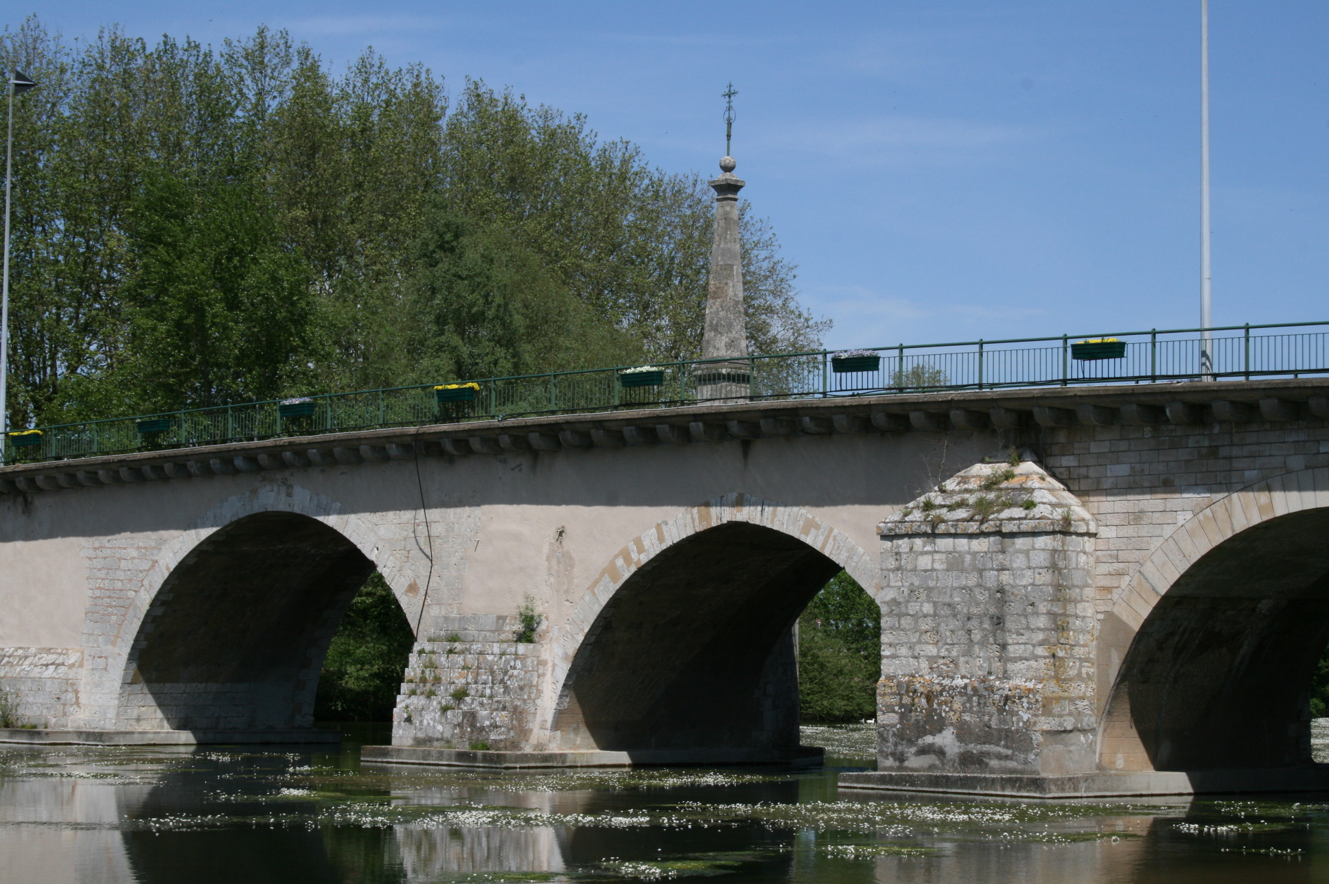 Pont Saint-Nicolas sur le Loiret – Communes de Saint-Pryvé-Saint-Mesmin et Saint-Hilaire-Saint-Mesmin – Département du Loiret – France – Pont en maçonnerie - Vue aval - Arches 5 (en plein cintre) et 4 (en arcs brisés) et obélisque.